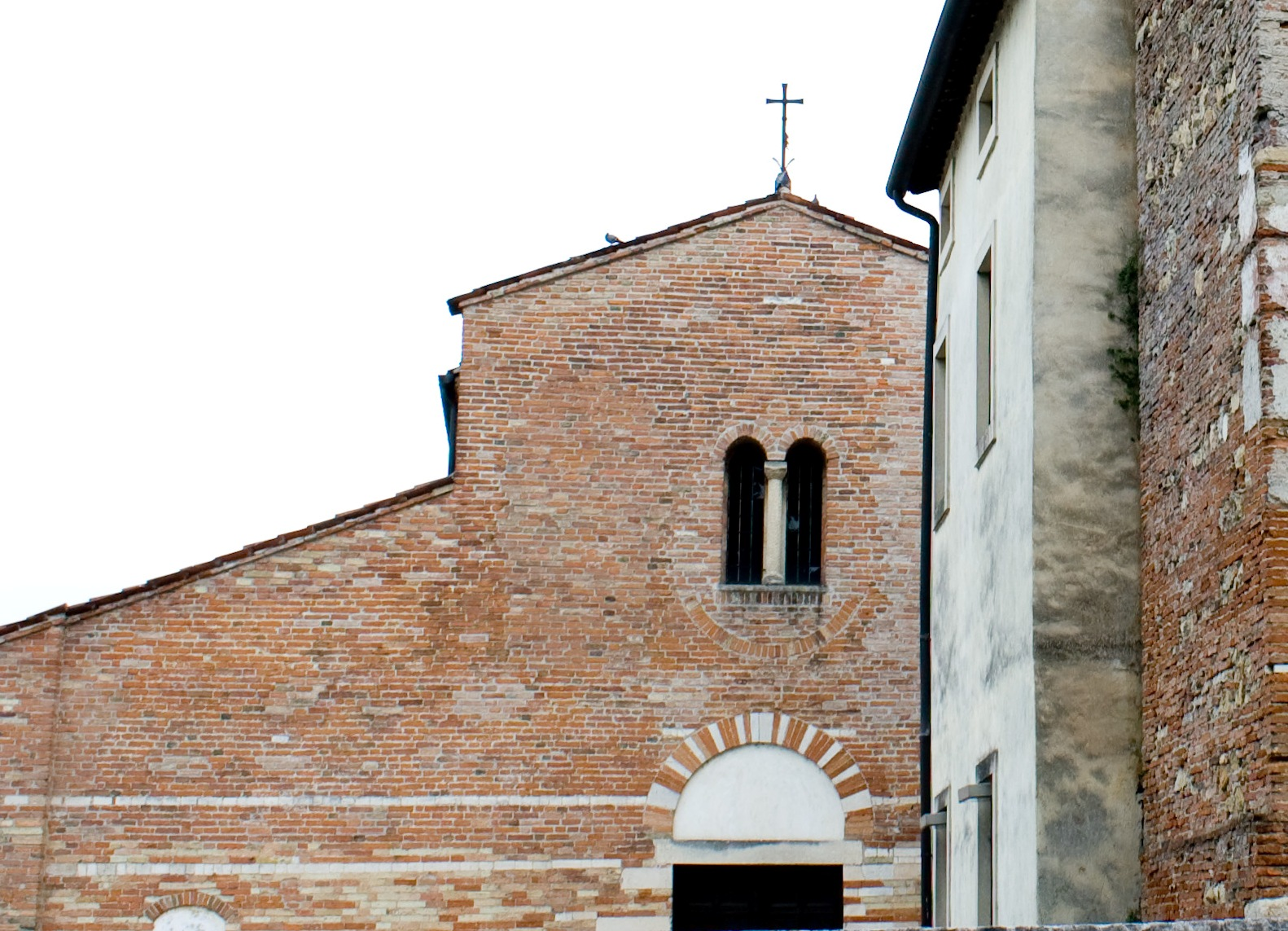 Vicenza - Complesso monumentale di San Silvestro - facciata della Chiesa, particolare